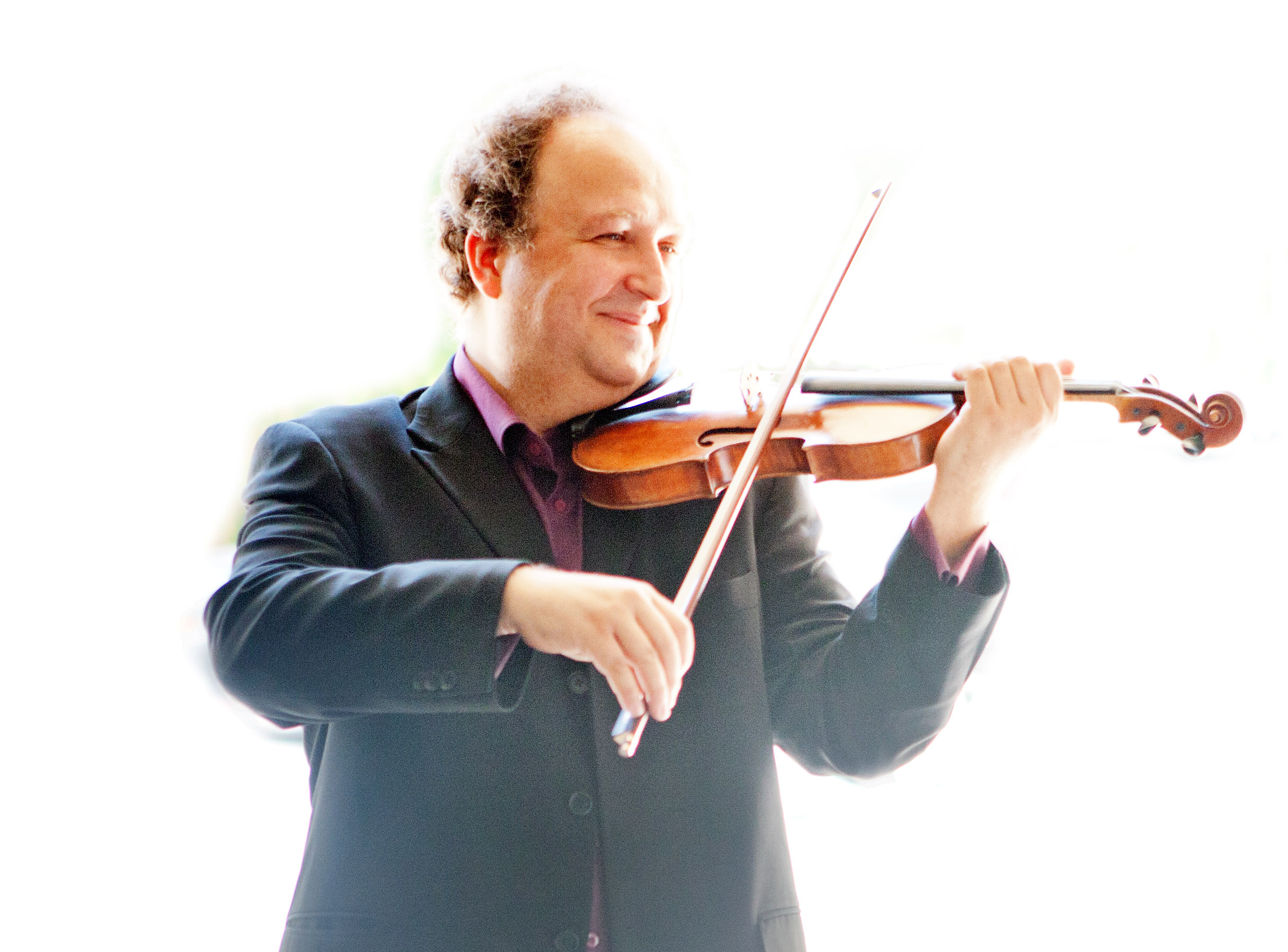 With violin